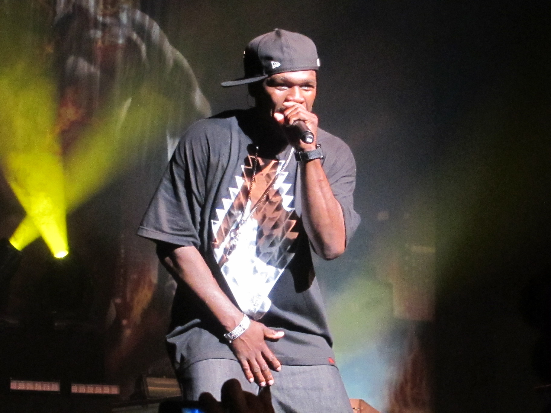 foto de 50 cent